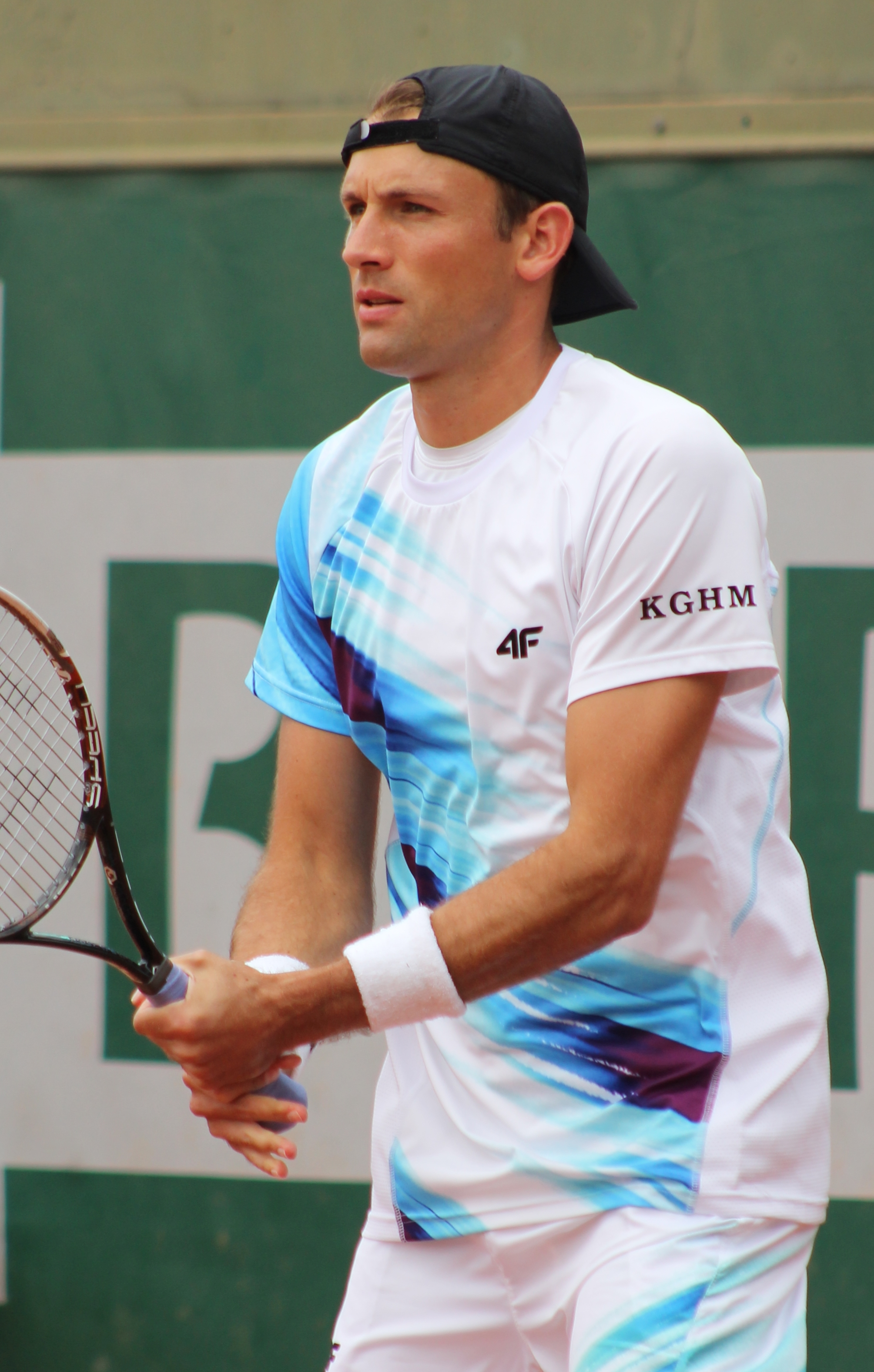 Kubot RG15 (13)